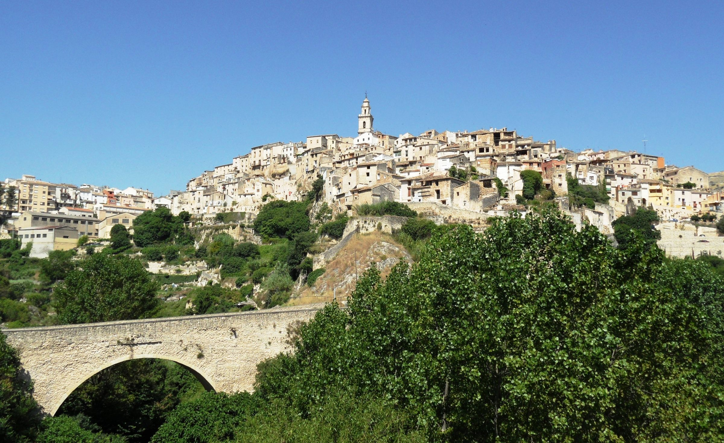 Vista de Bocairent amb el pont de Darrere la Vila.